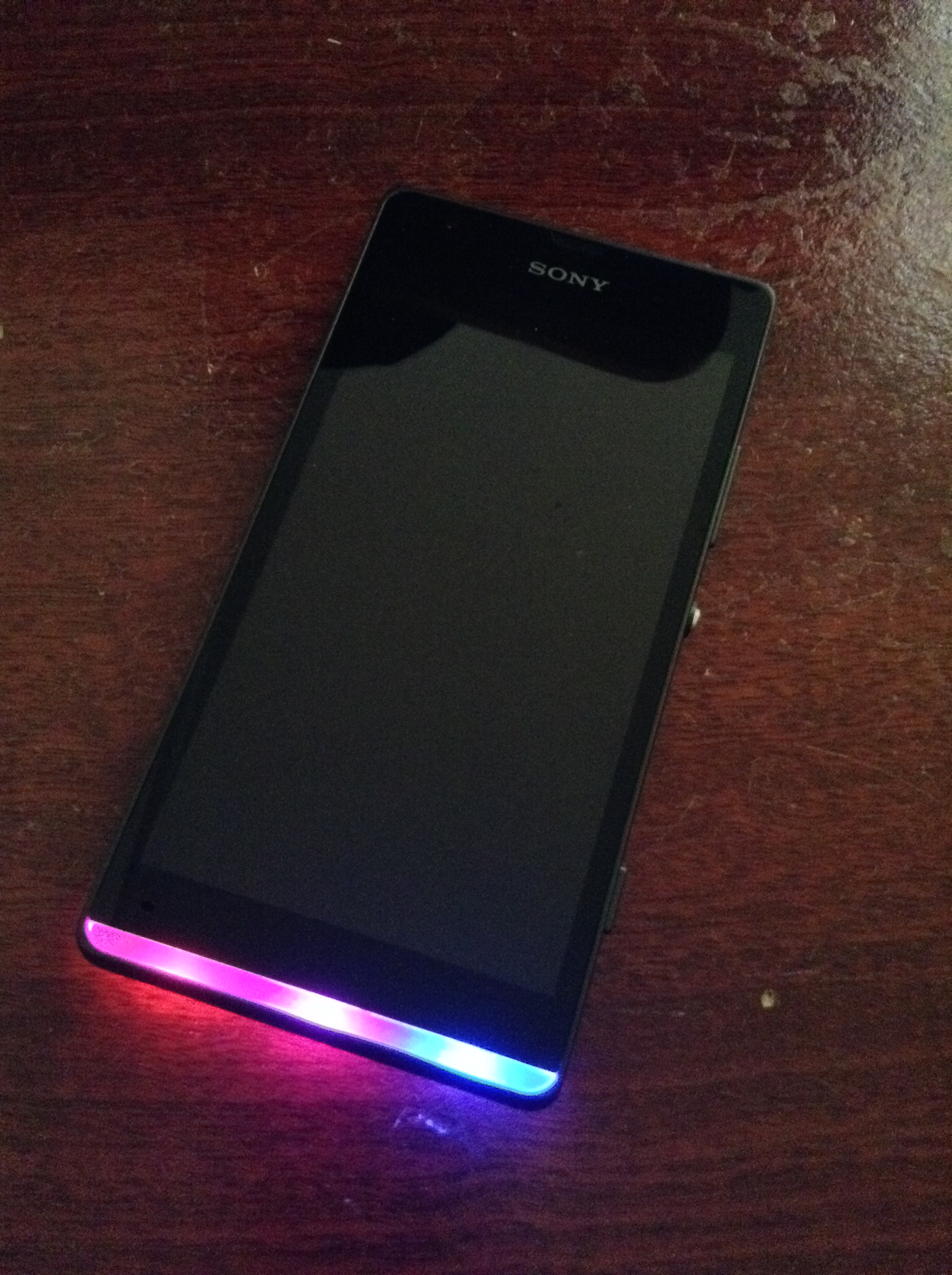 barra de luces led del sony xperia sp